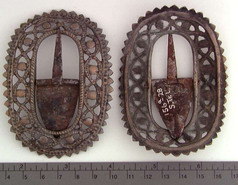 Skospenner støpt i messing med tein av jern fra Horg i Sør-Trøndelag. Foto Anne-Lise Reinsfelt / Norsk Folkemuseum, NF.1928-0156.